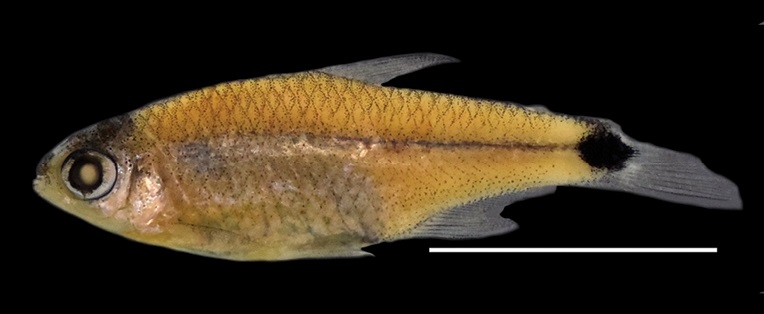 Odontostilbe gracilis. Río Amapá, Brasil. Barra escala: 1 cm. Melo BF, Benine RC, Britzke R, Gama CS, Oliveira C (2016) An inventory of coastal freshwater fishes from Amapá highlighting the occurrence of eight new records for Brazil. ZooKeys 606: 127-140.